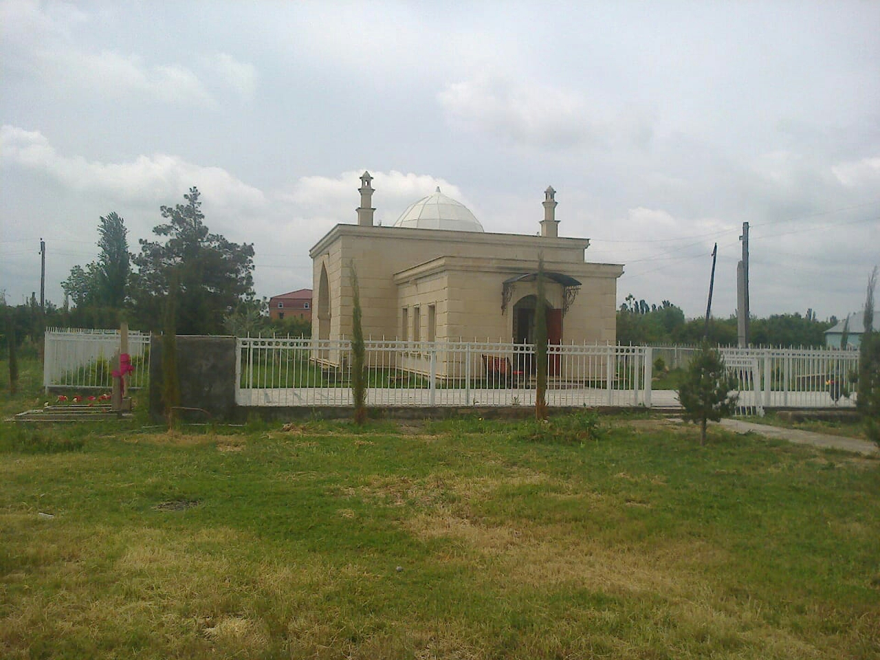 Baba Samid minbəri